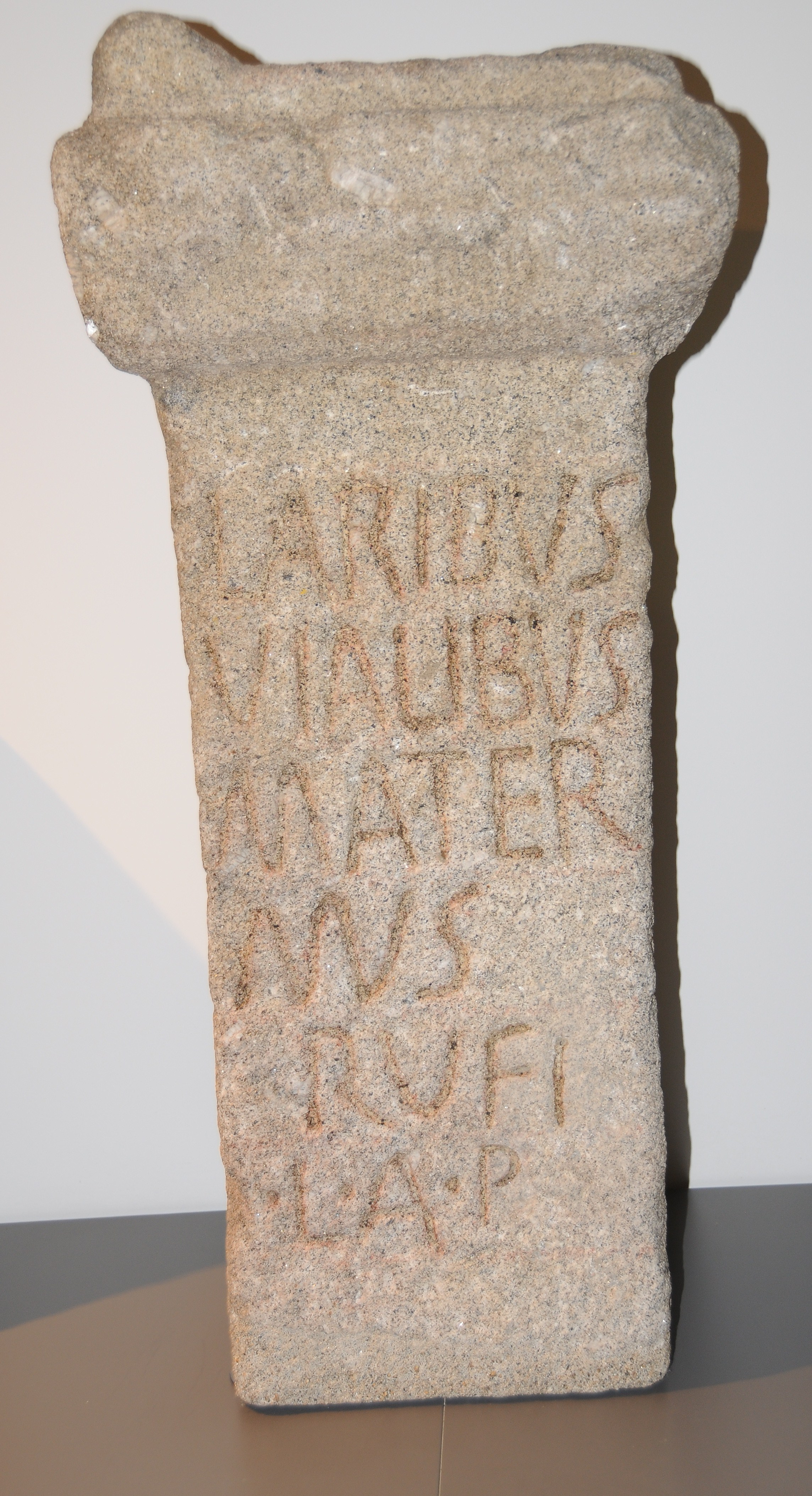 Ancient Roman inscription in D. Diogo de Sousa Museum, Braga, Portugal